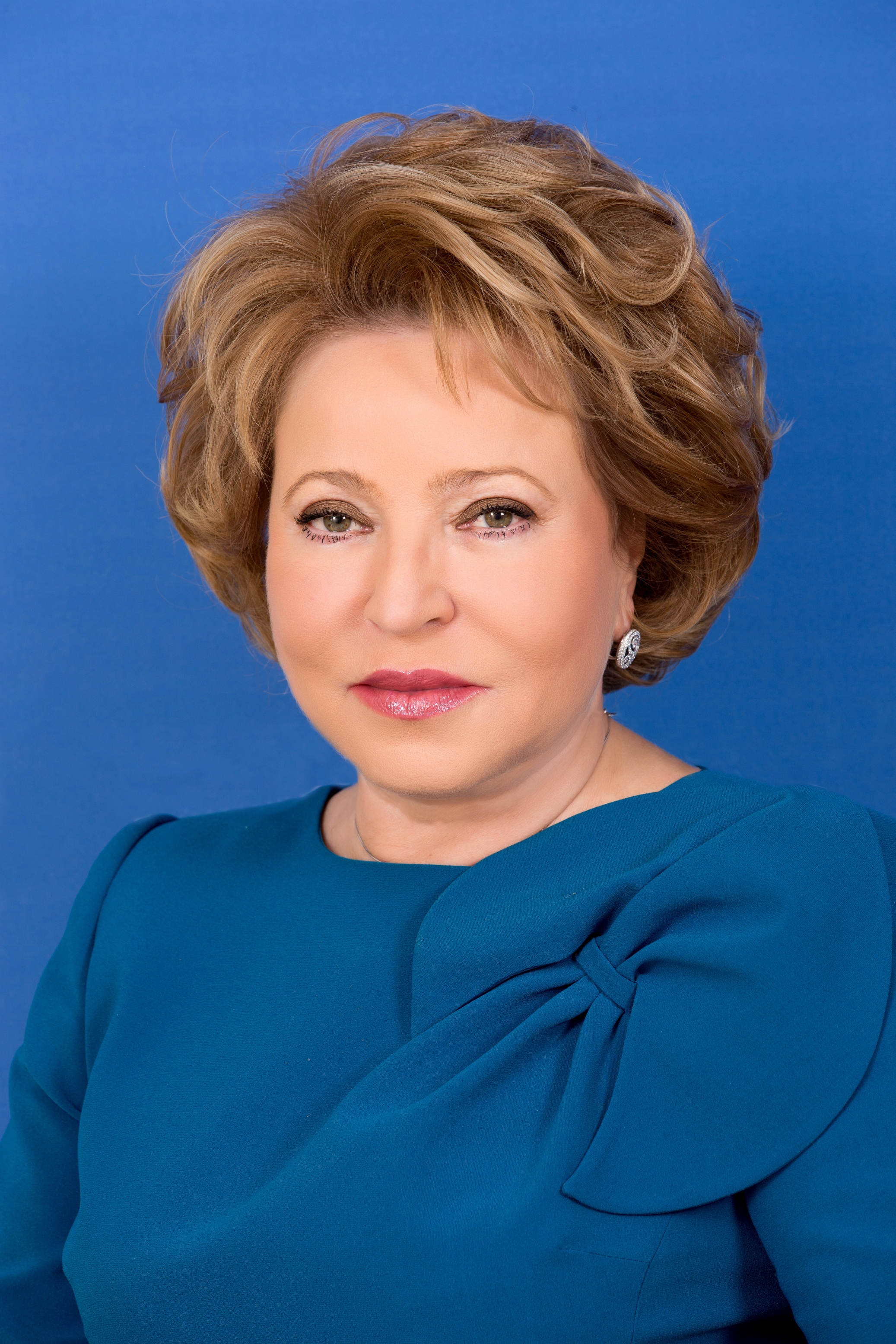 Председатель Совета Федерации Федерального Собрания Российской Федерации , фотография значительно отредактирована